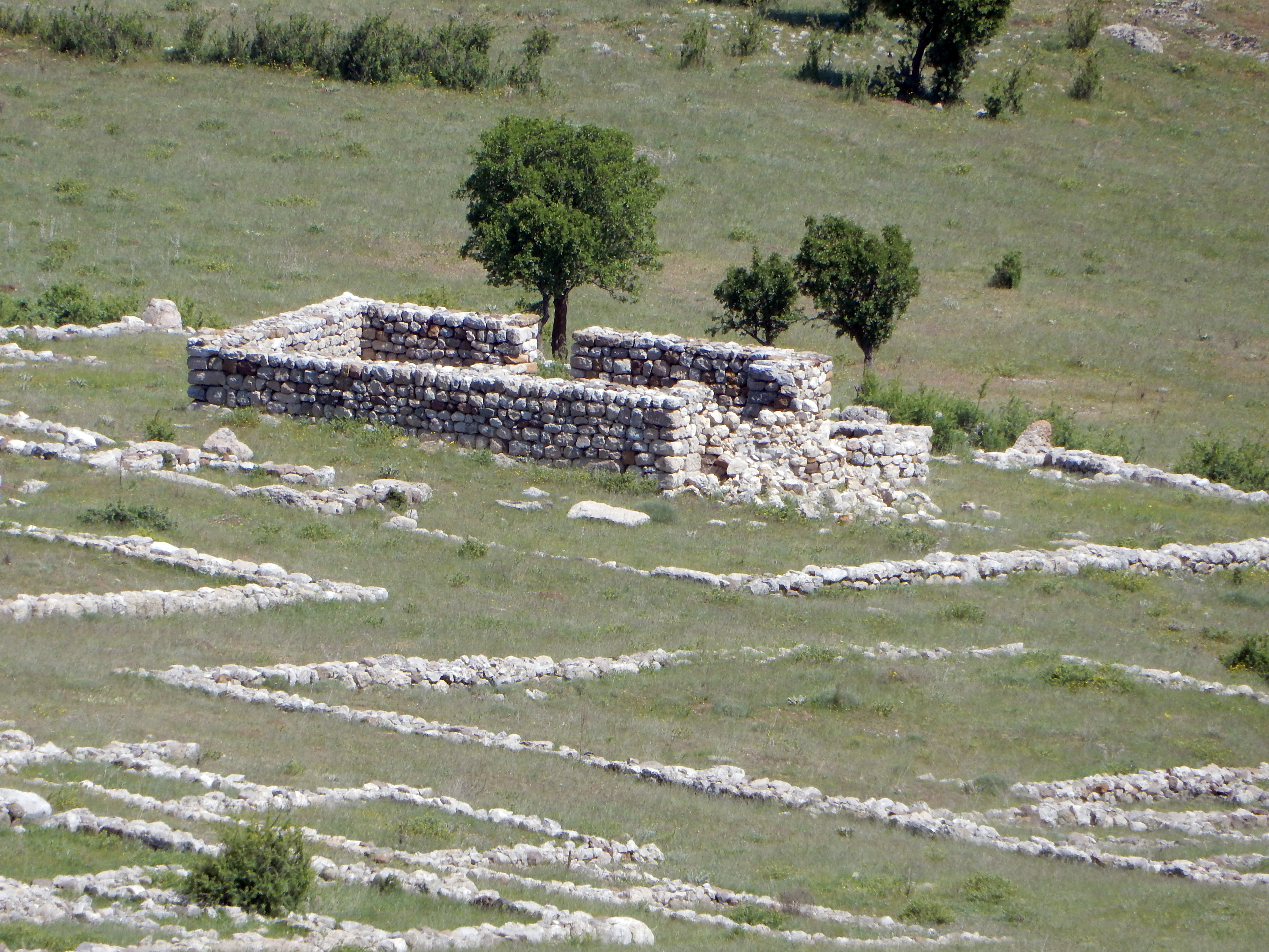 Ḫattuša, Hauptstadt der Hethiter, Ruine einer byzantinischen Kirche im oberen Tempelviertel